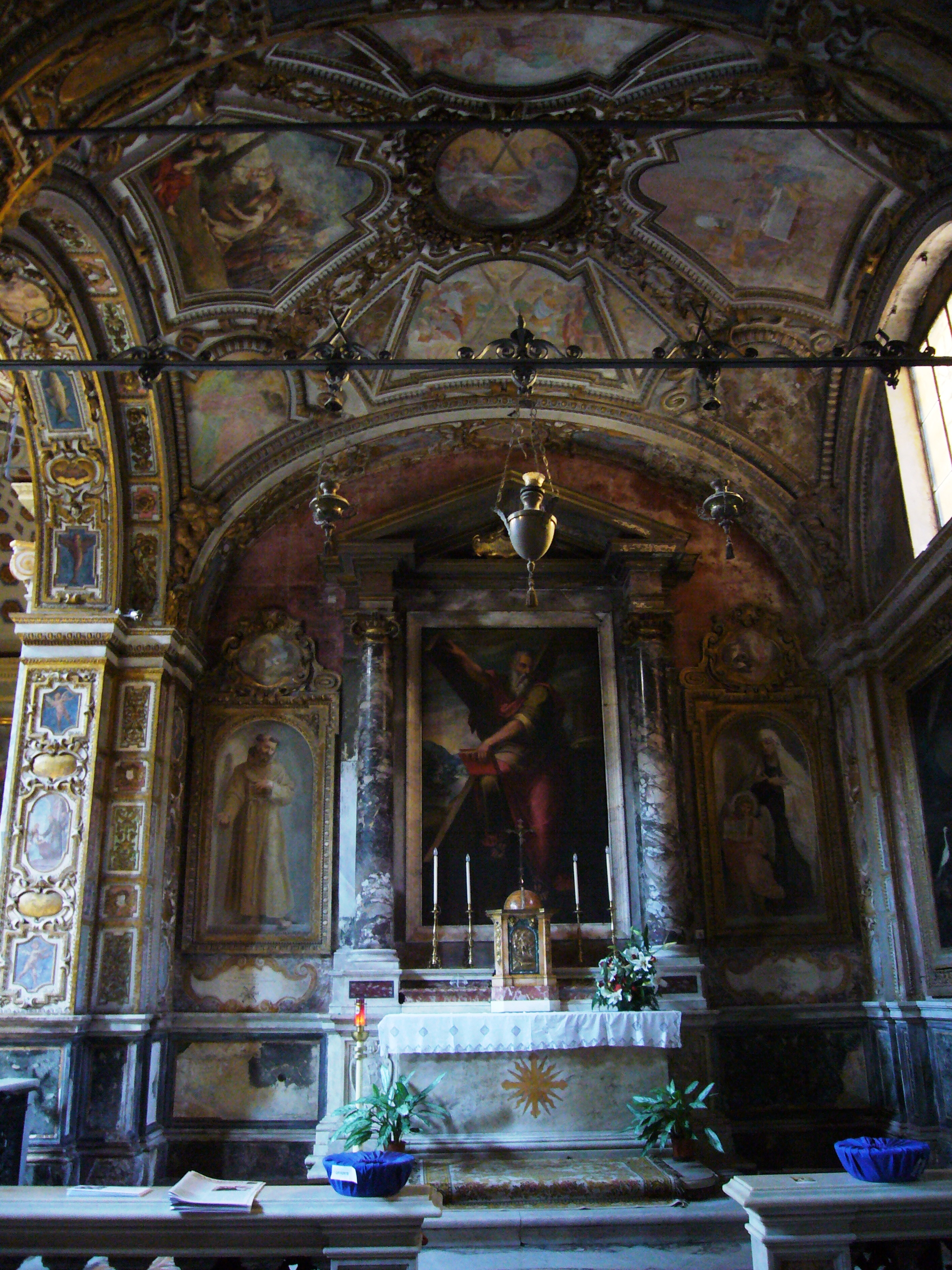 Roma, sant'Angelo in Pescheria: cappella di sant'Andrea